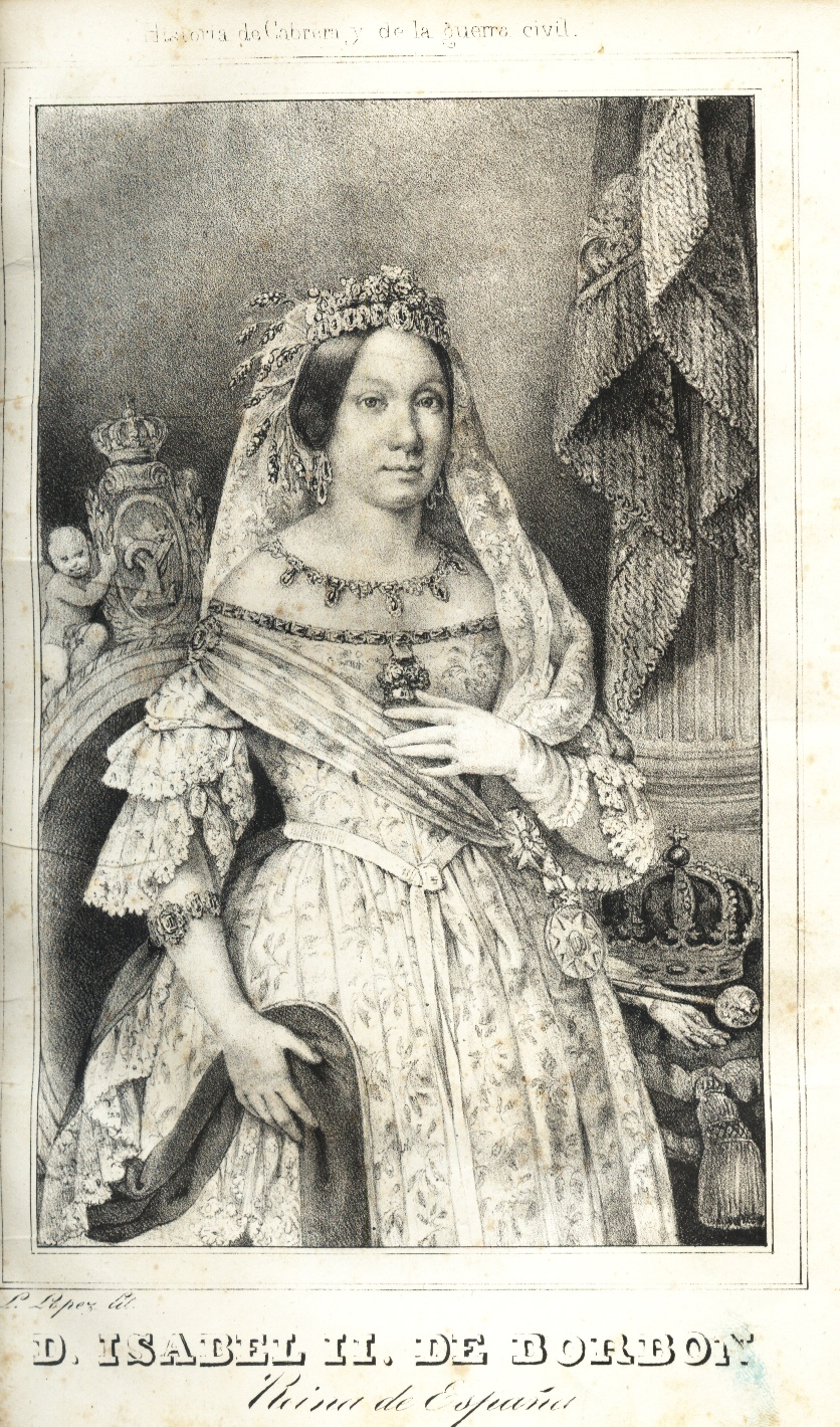 Isabel II. Dámaso Calbo y Rochina de Castro. "Historia de Cabrera". Madrid 1845